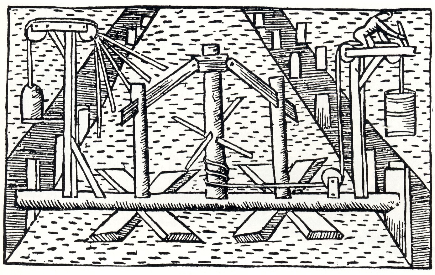 Dubbel pålkran enligt Olaus Magnus som används för pålningsarbeten för pålkransen kring Stadsholmen (Stockholm)